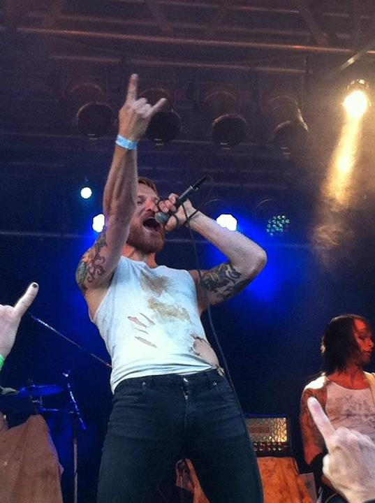 Nifters live på Skogsröjet 2011